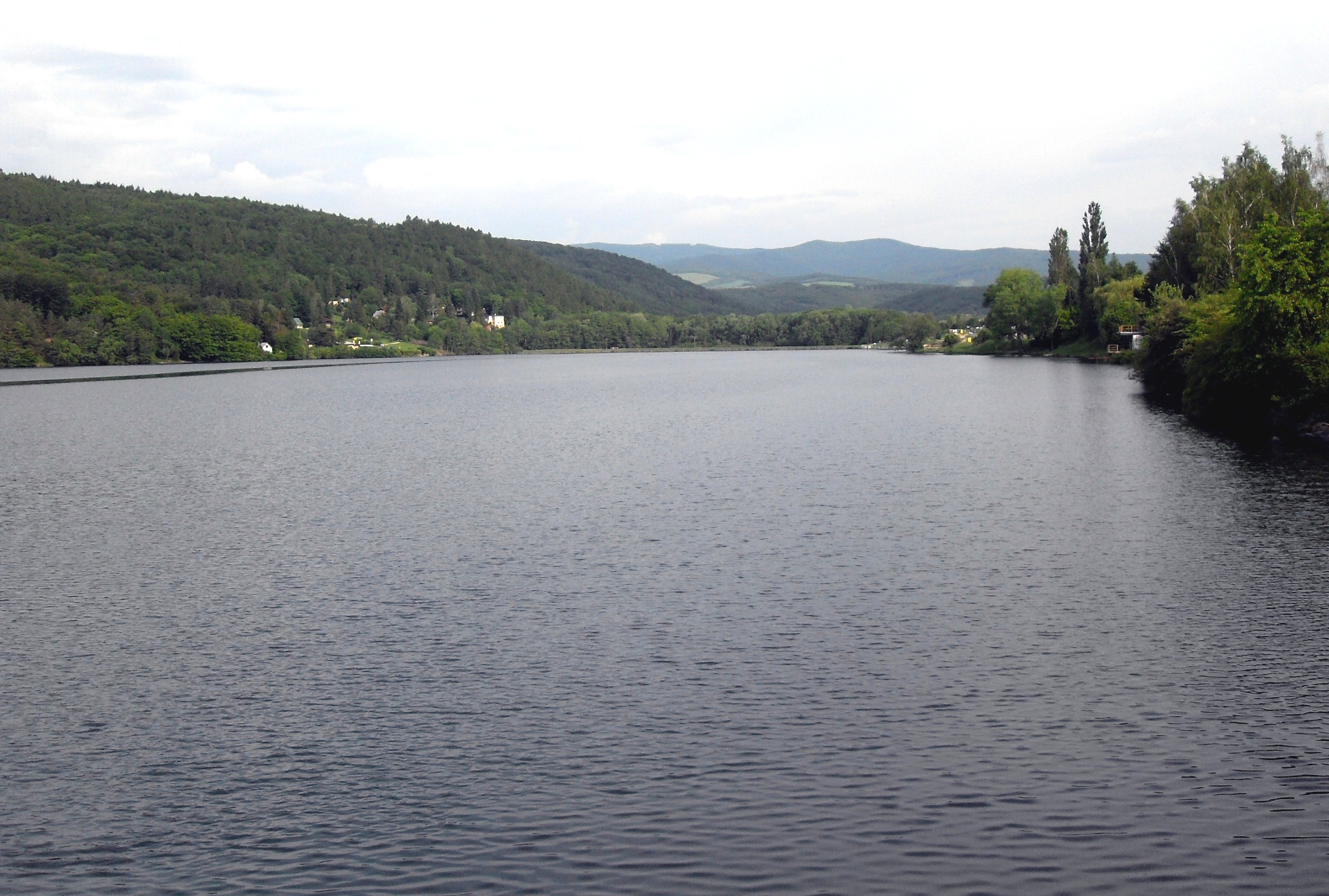 vodná nádrž Pod Bukovcem